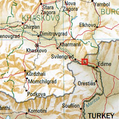 Kapitan Andreewo – Lage der Stadt in Bulgarien